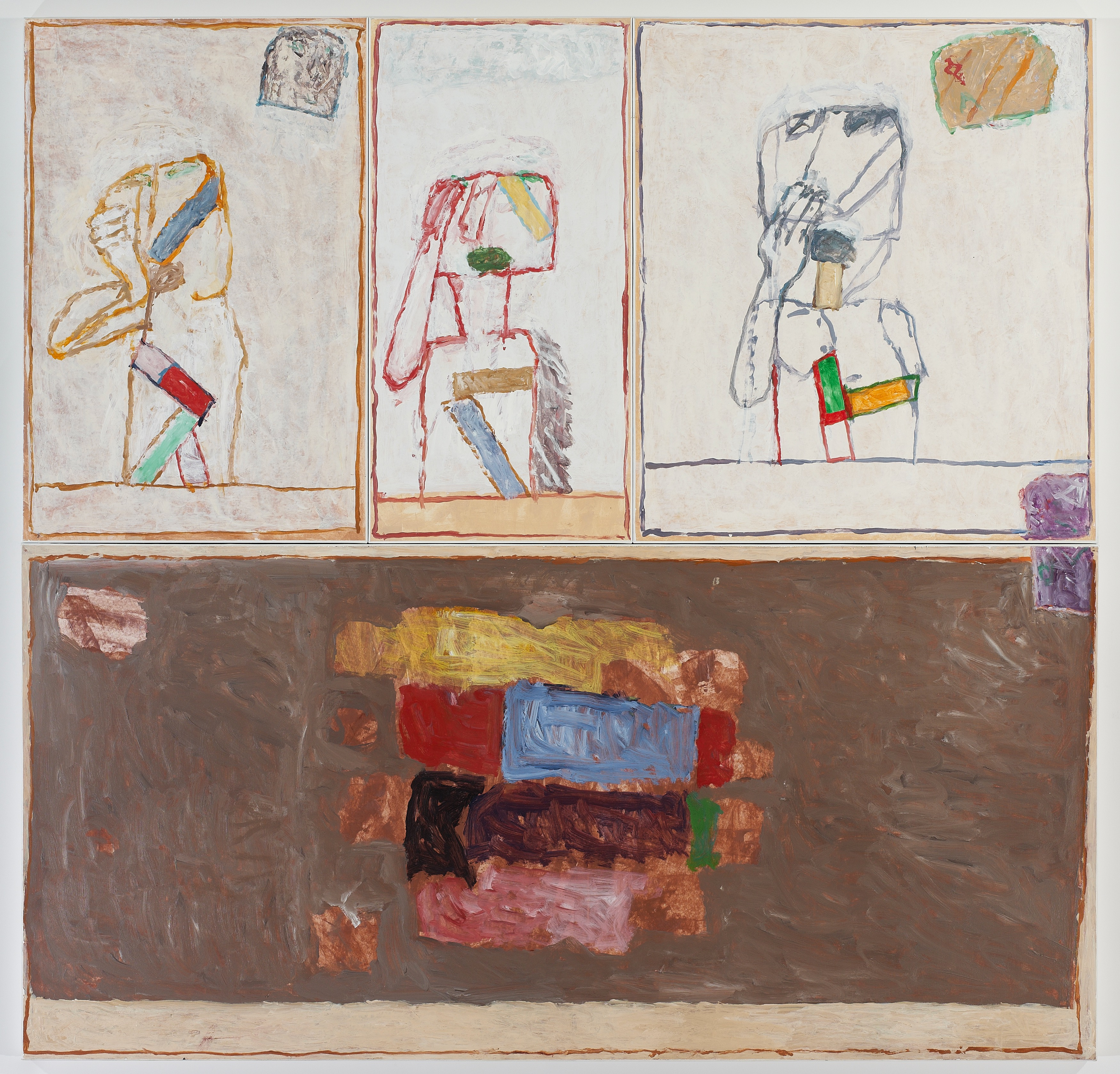 Oeuvre du peintre François Dilasser (1926-2012)